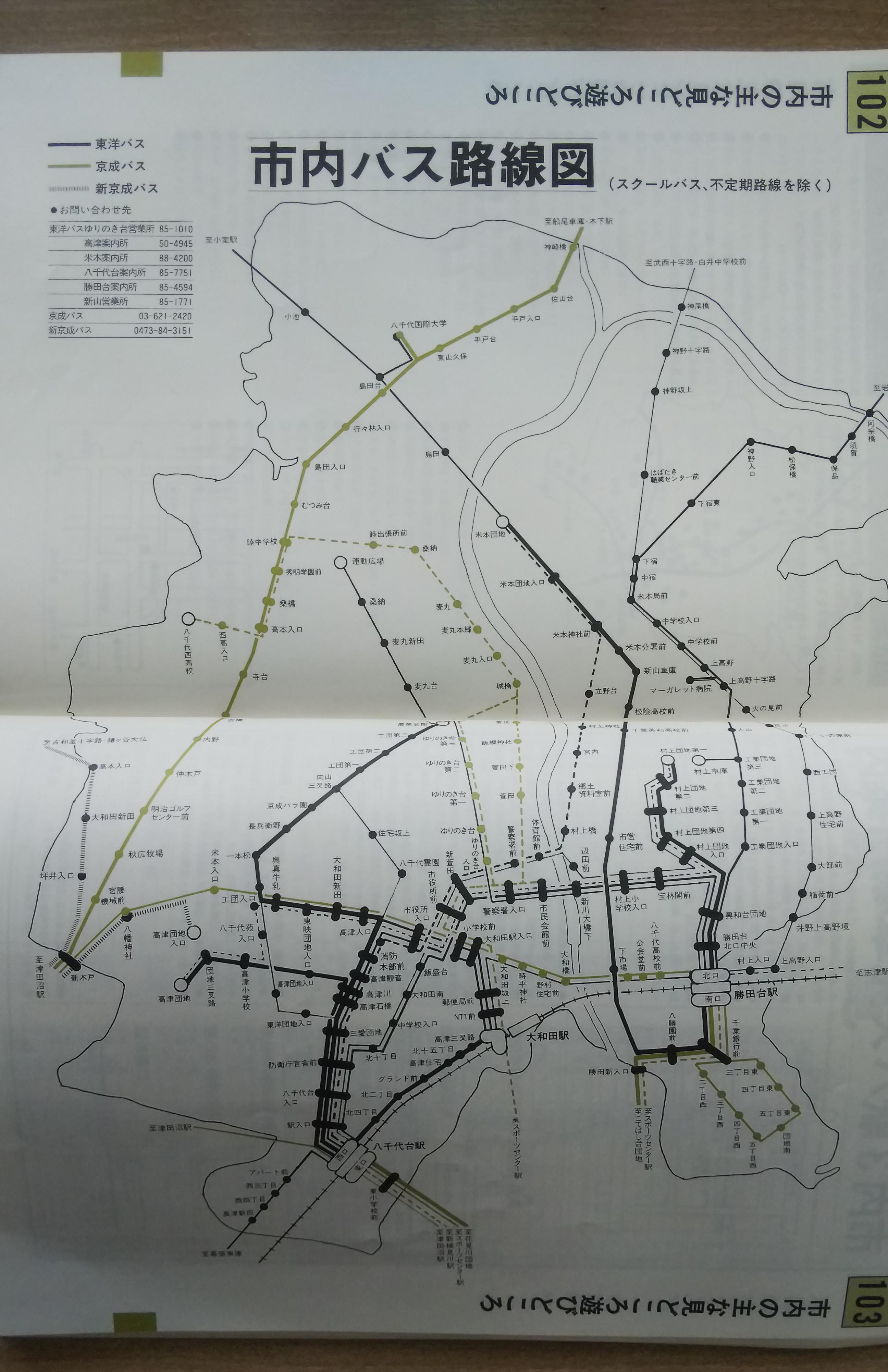 東葉高速線開通以前の、八千代市のバス路線網